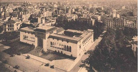 Photo du palais de justice, prise les années 20